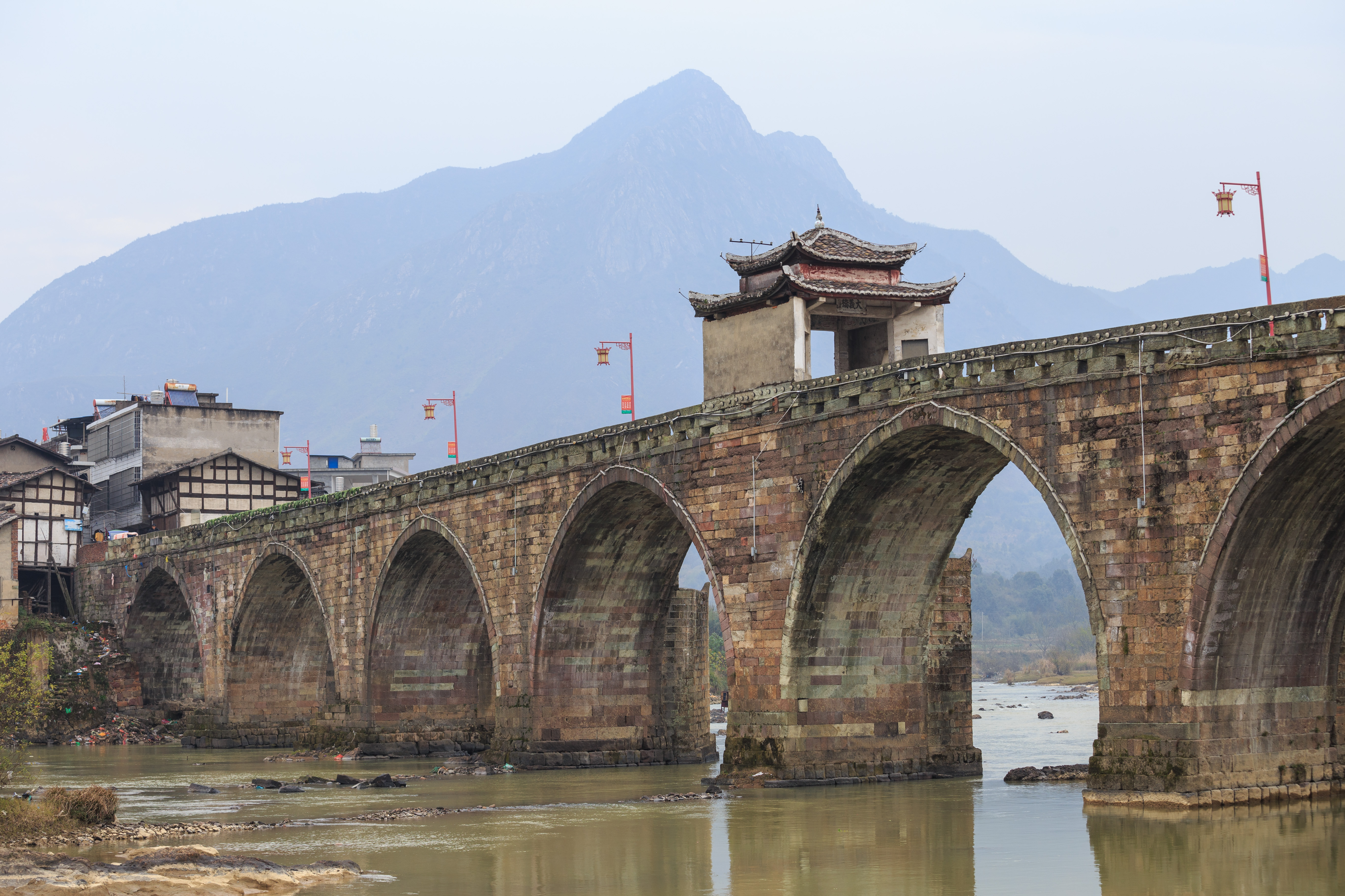 铅山永平大义桥